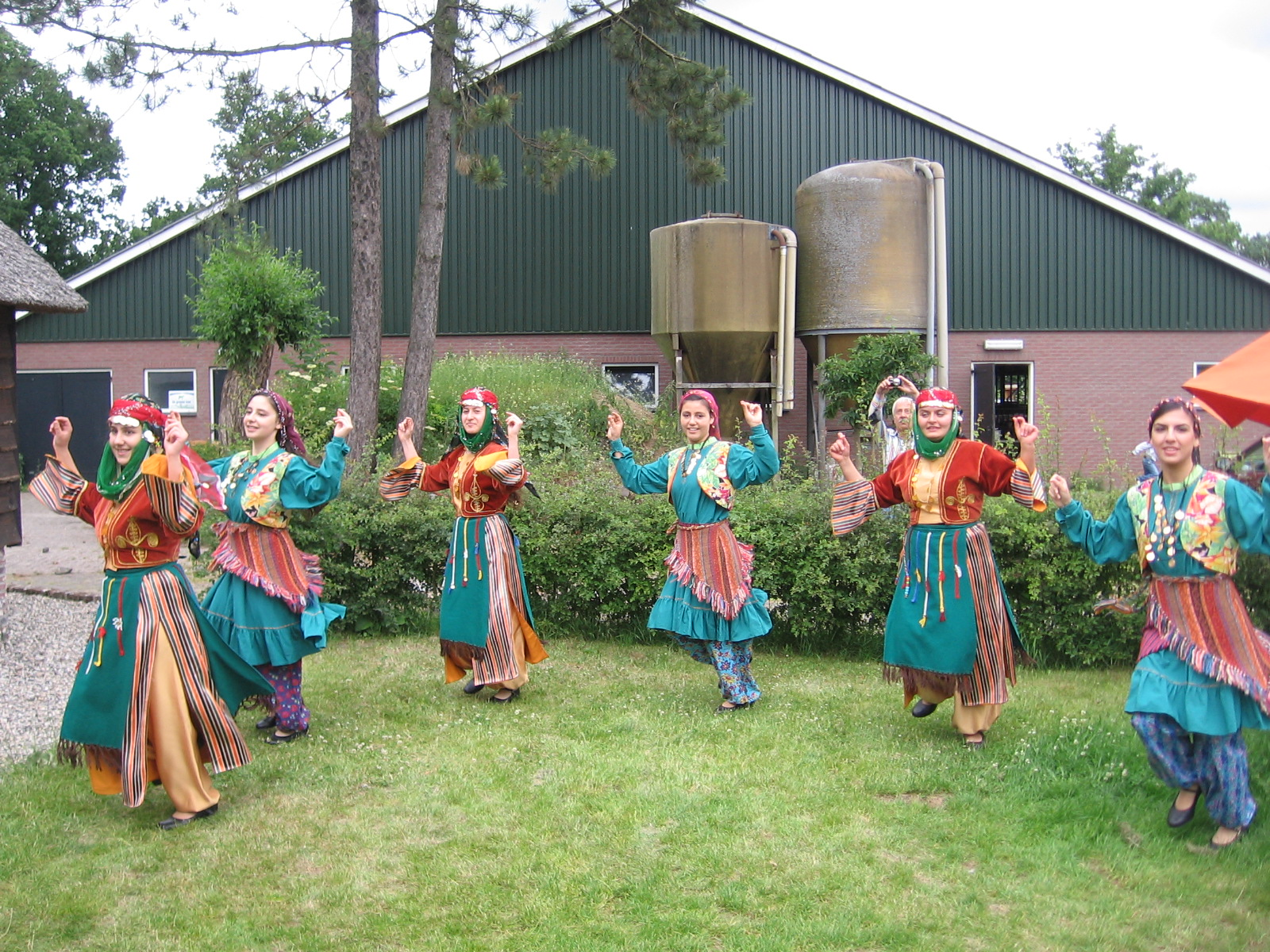 Multiculti! Turkse dans tegen decor van Hollandse boerderij